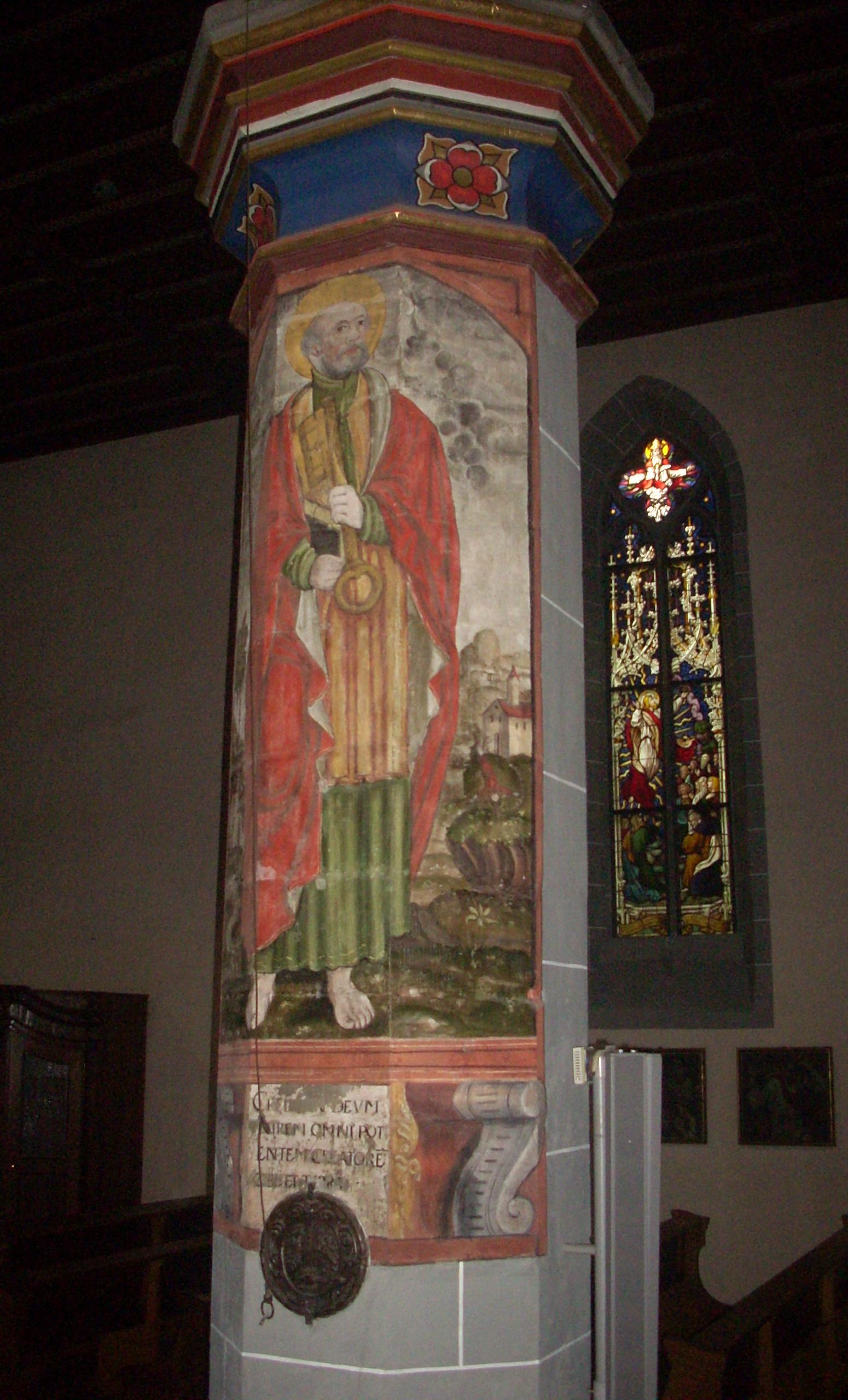 Konstanz, St. Stephan, Apostel Petrus (Pfeilerbild im Langhaus, um 1580)